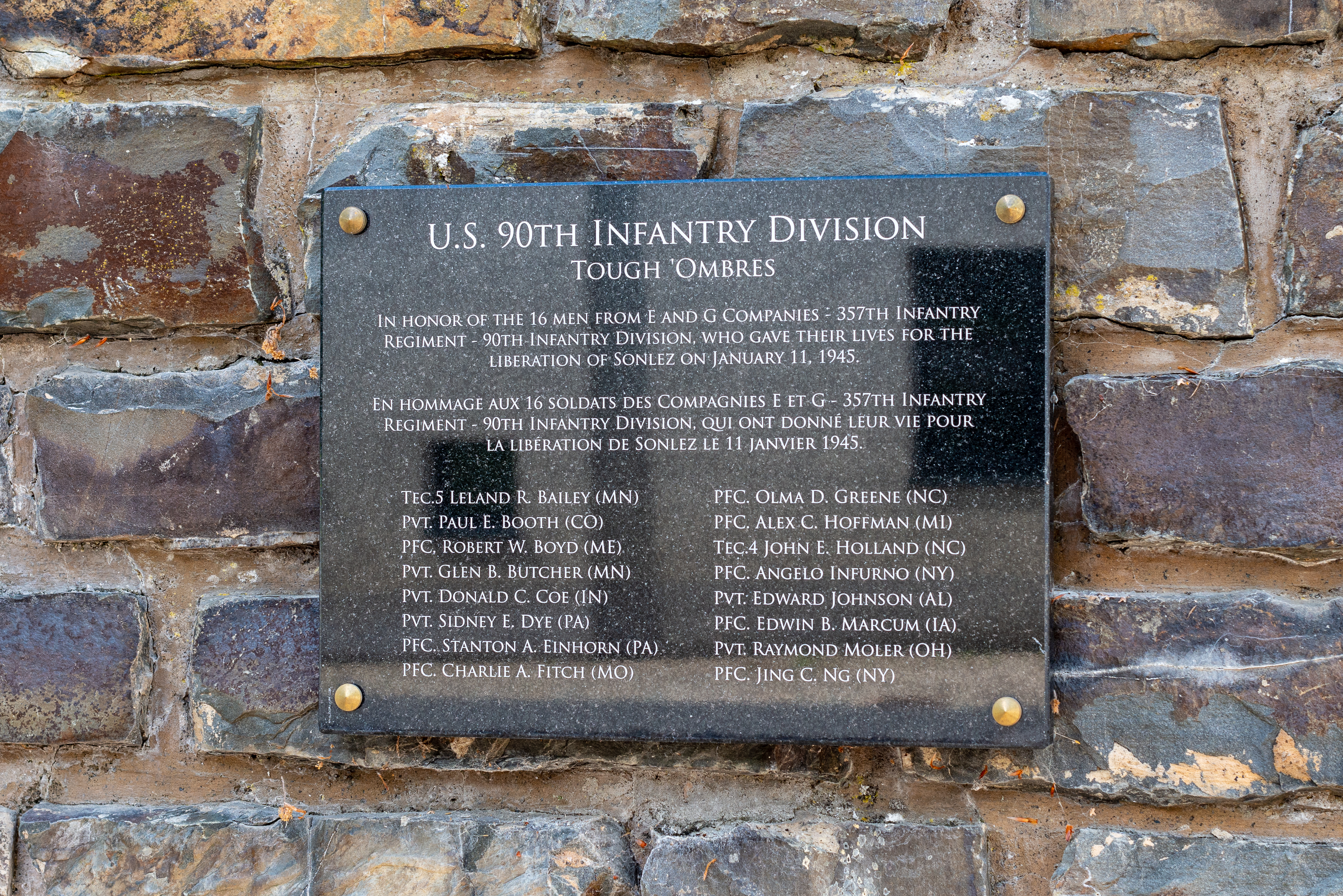 Erënnerung un déi 16 amerikanesch Jonge vum 357. Infanterie-Regiment (90. Infanterie-Divisioun - Tough 'Ombres), déi den 11. Januar 1945 zu Soller während der Ardennenoffensiv gefall sinn.D'Plack ass baussen un der Kierfechtsmauer (Rue Jean-Baptiste-Determe) ubruecht.